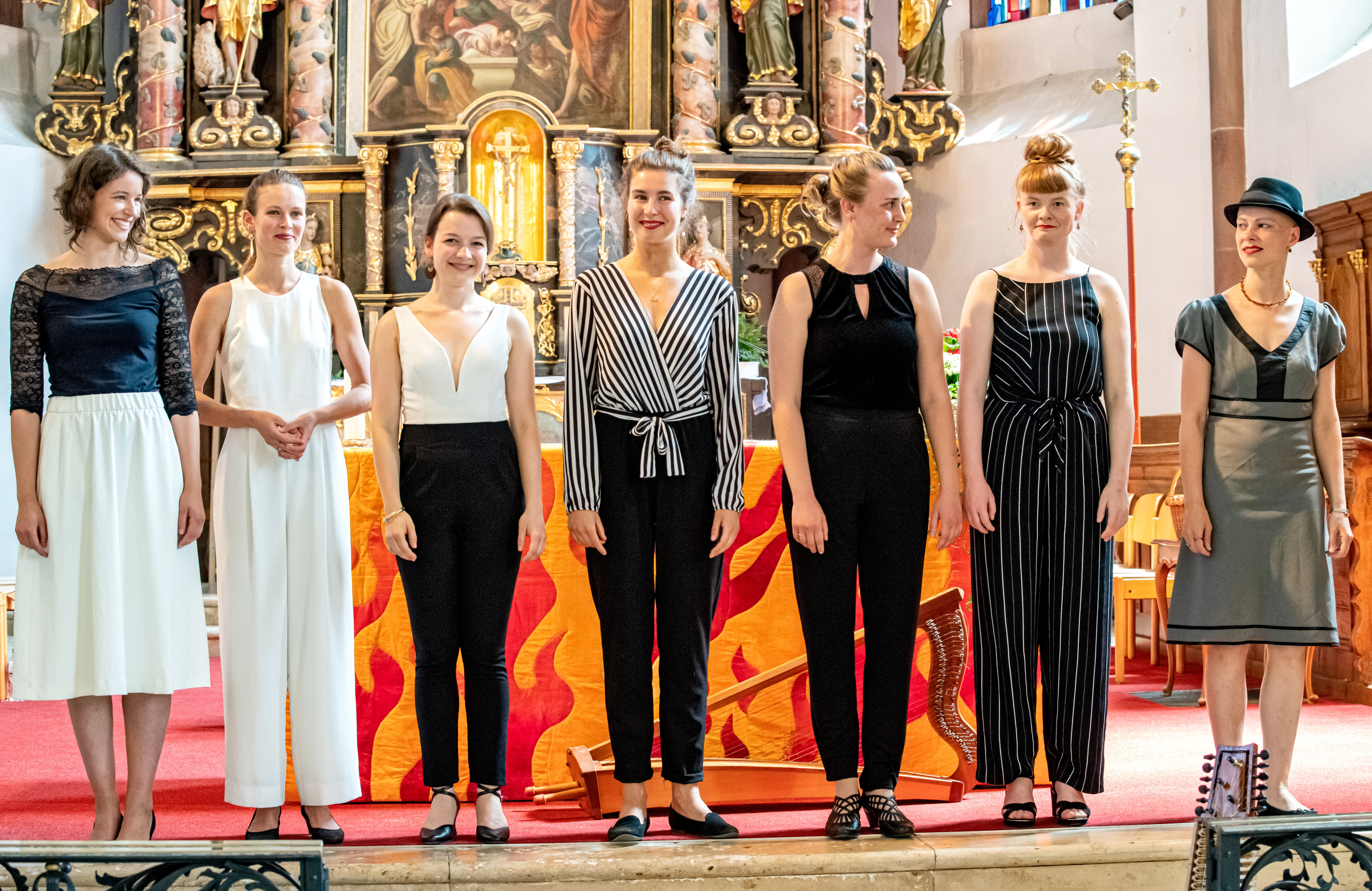 Bilder vom Black Forest Voices Festival in Kirchzarten. Ein Festival mit Workshops für Chöre und A Capella Gesang vom 27. 6. 2019 zum 30.06. 2019 Das Konzert in der Kirche St. Gallus Kirchzarten